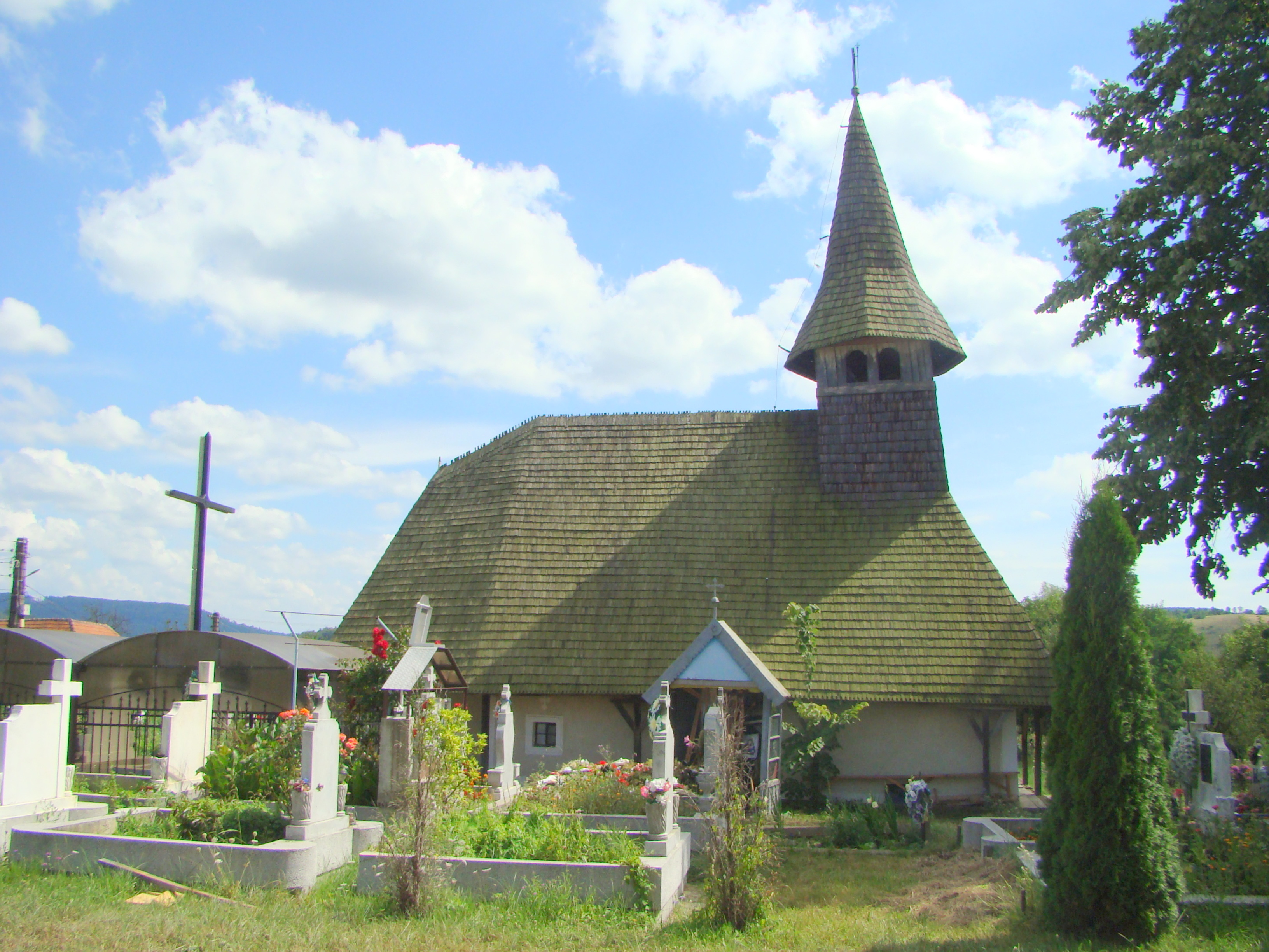 Biserica de lemn din satul Vârciorog, judeţul Bihor